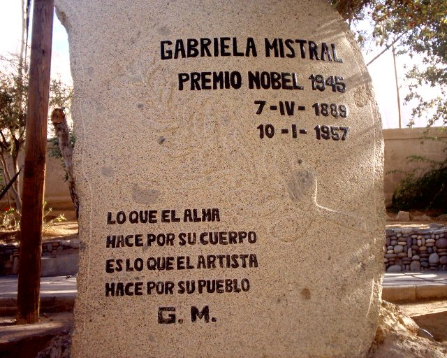 Recuerdo a Gabriela Mistral y la obtención del Premio Nobel. Vicuña.